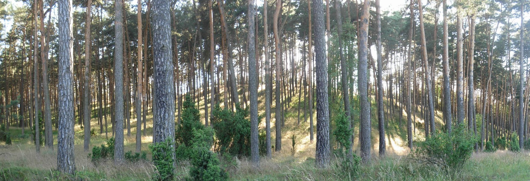 Zalesiona wydma śródlądowa - Puszcza Bydgoska